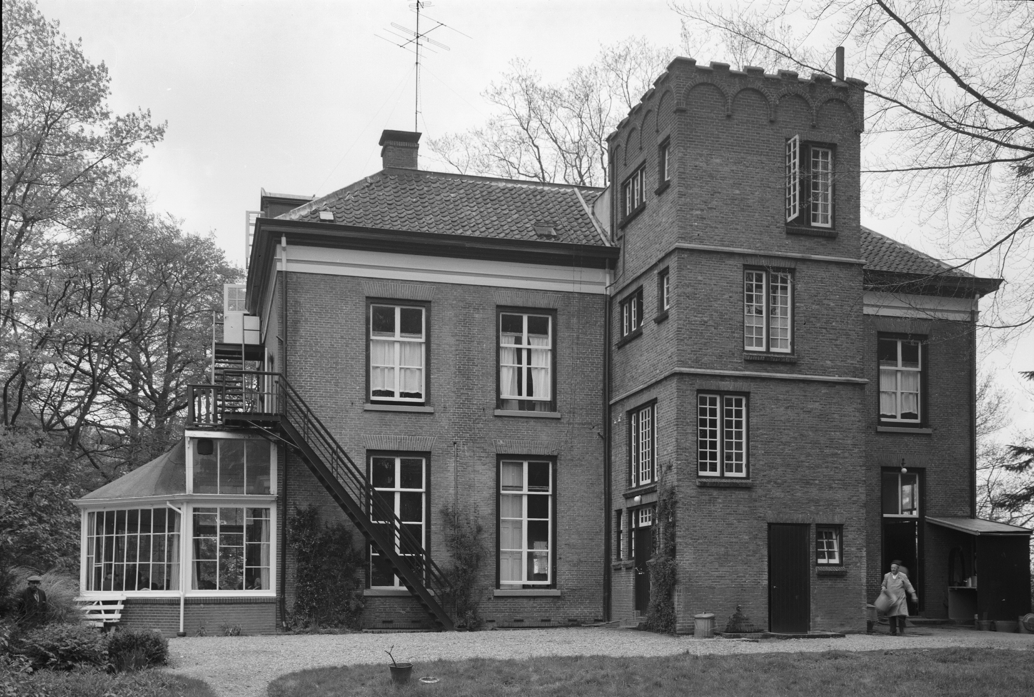 Diversen: "'t Regelink", achterzijde